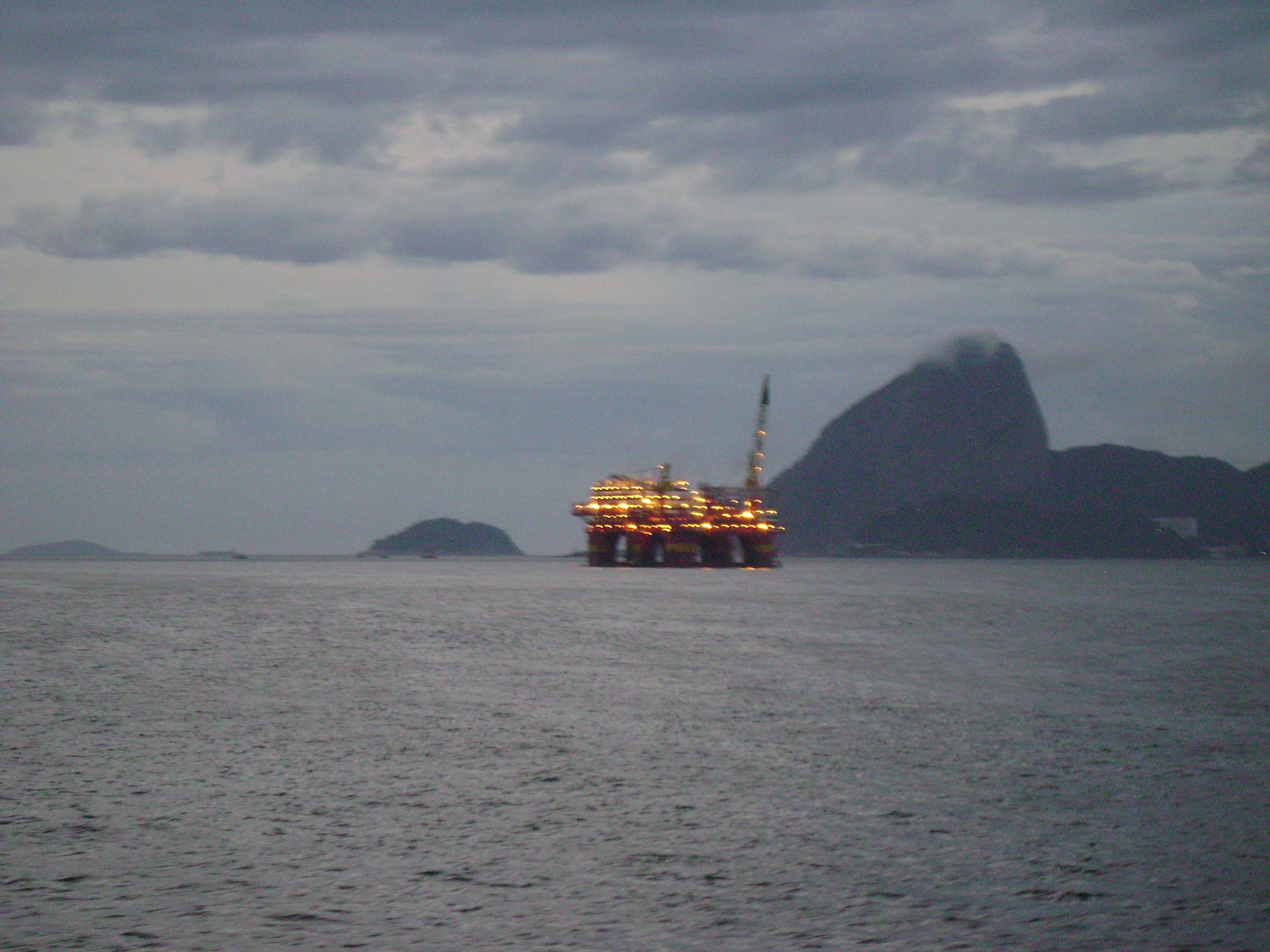 Plataforma na Baía de Guanabara, Rio de Janeiro.